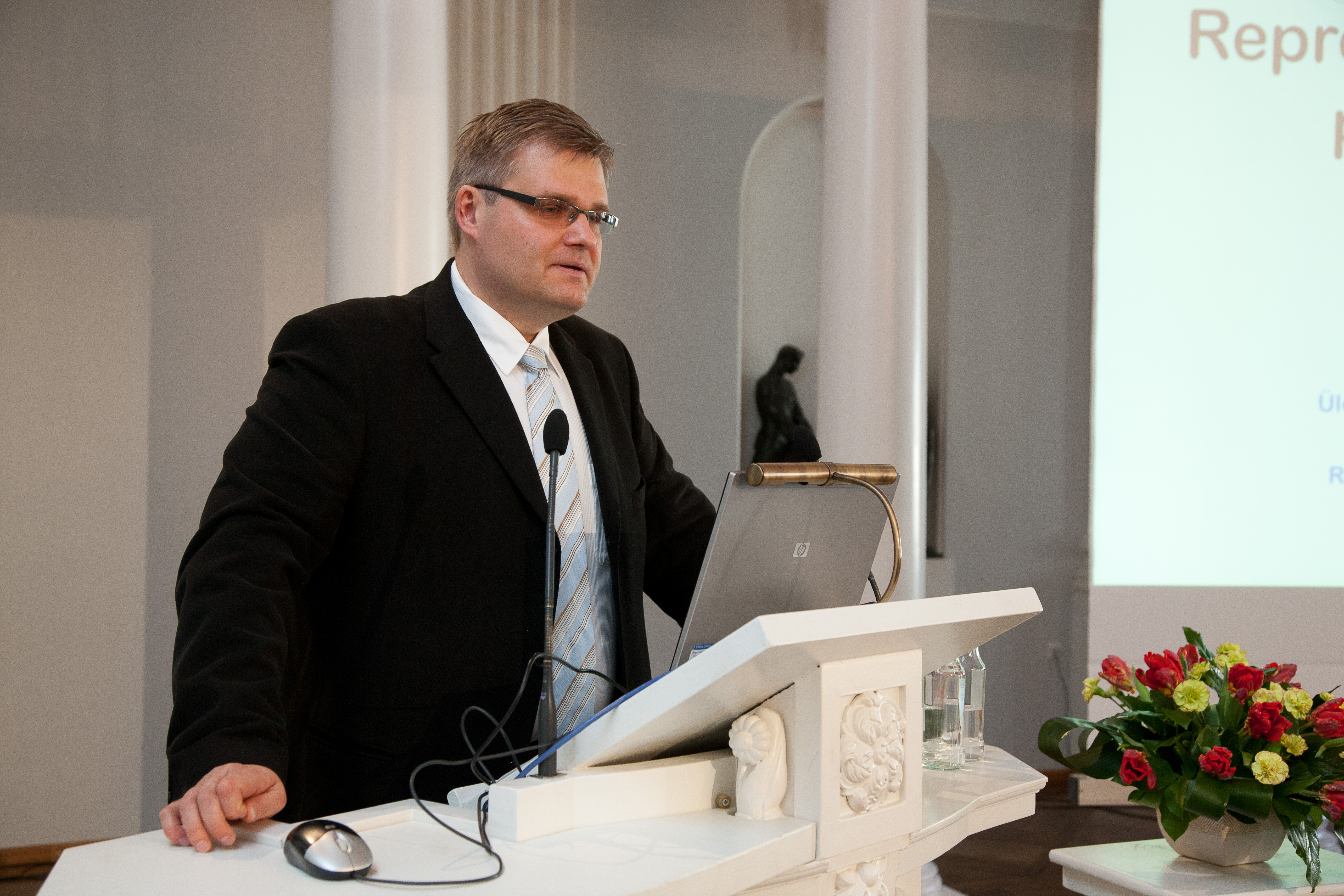 26. aprillil 2011 pidas Tartu Ülikooli reproduktiivmeditsiini professor Andres Salumets TÜ aulas inauguratsiooniloengu teemal „Reprodukstiivmeditsiini perspektiivid”.